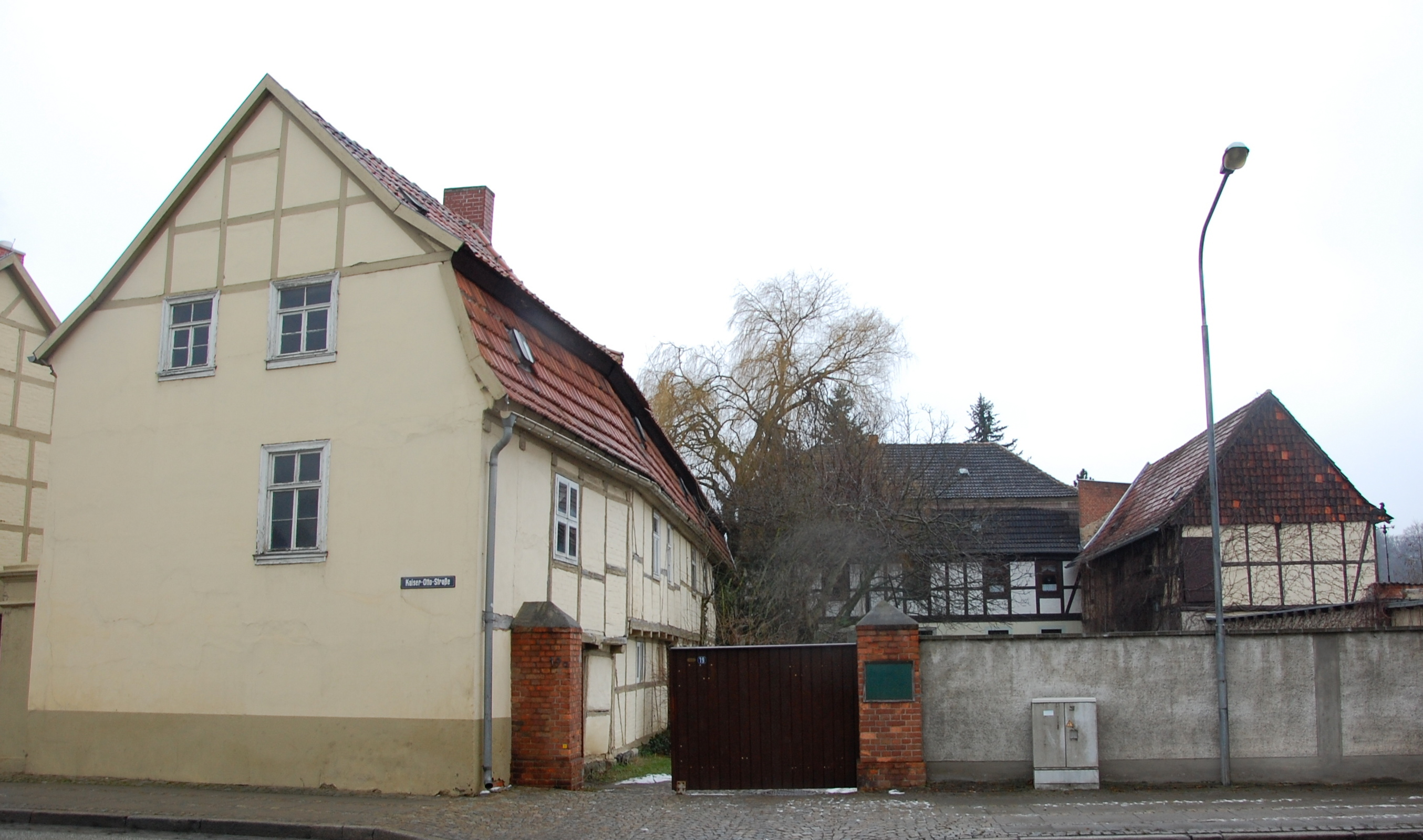 Kaiser-Otto-Straße 19 (Quedlinburg)